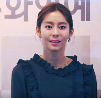 2018 제23회 소비자의 날 KCA 문화연예 시상식 레드카펫